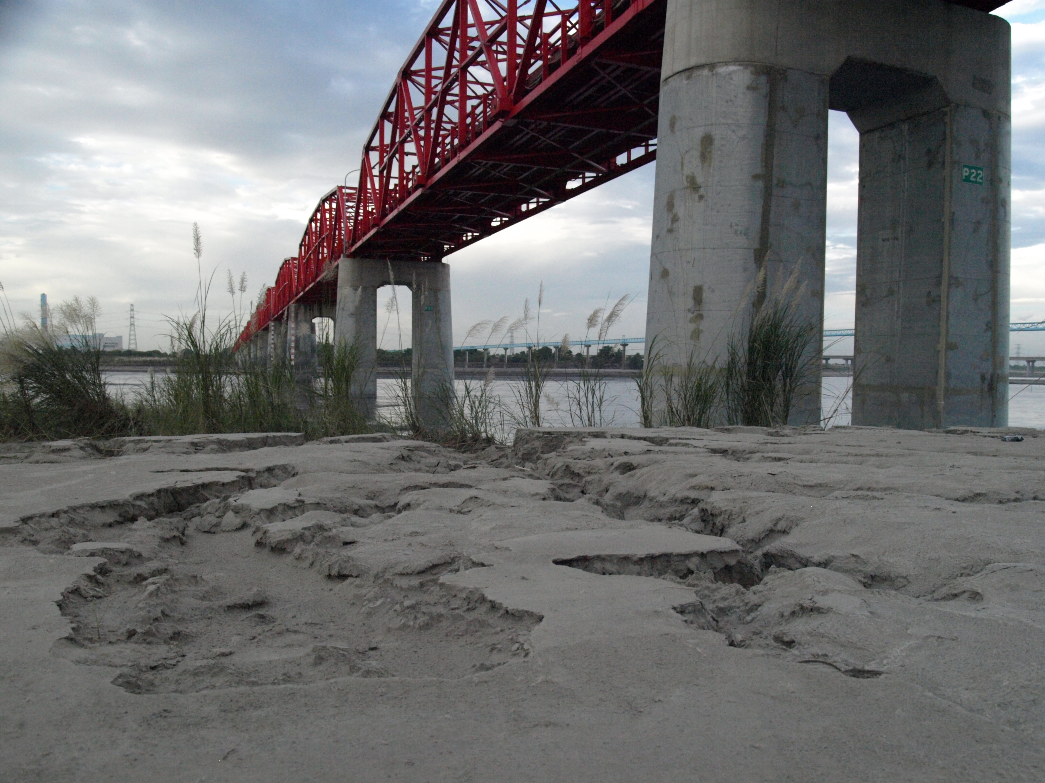 西螺大橋於1937年（昭和12年）開始發包興建，日治時期主要的建設部分為橋墩，方法是先以鐵條綁出橢圓形空心板模，接著灌漿抽沙來加重重量使板模下沉，如此反覆作業，使每座橋墩的基樁高度約二層樓高，32座橋墩於1941年完成，之後因戰爭鋼材挪作他用而中止建設，成為未成道路。國民政府遷台之後，在美援下於1952年5月29日再度開工。